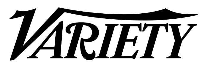 Logotipo de la revista estadounidense Variety.